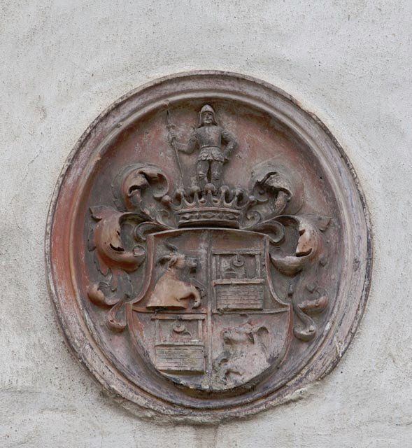 Wappen der Familie der Fhr. von Rolsberg am alten Schloss, Foto von Fam. Mayerh. 2010